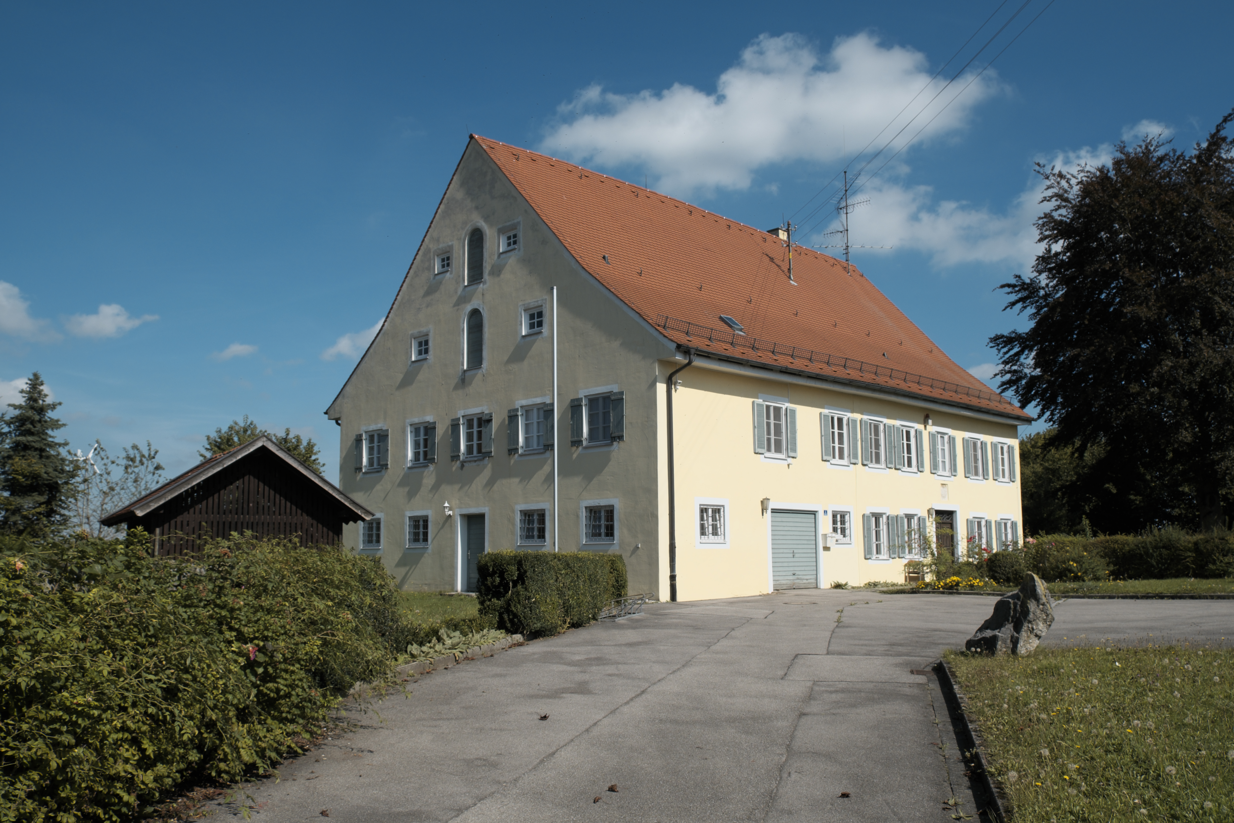 Ehemaliges Pfarrhaus in Kaufering im Landkreis Landsberg am Lech (Bayern/Deutschland)